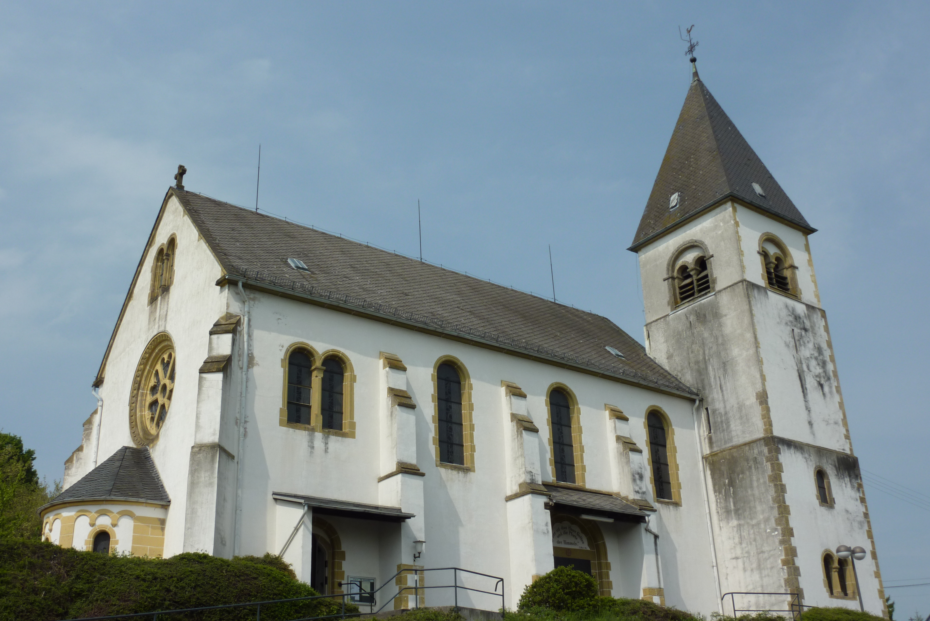 katholische Pfarrkirche St. Dionysius in Kirchwald, von Süden